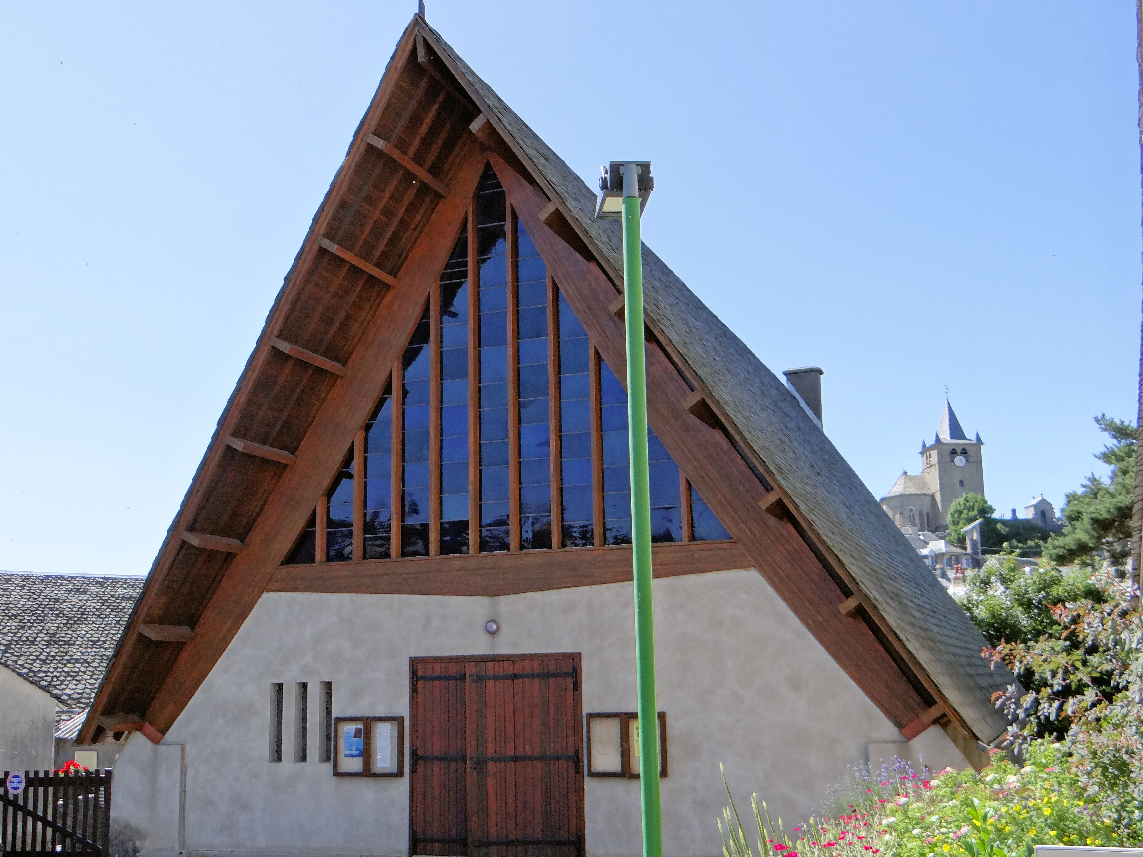 Laguiole - Chapelle et église Saint-Matthieu